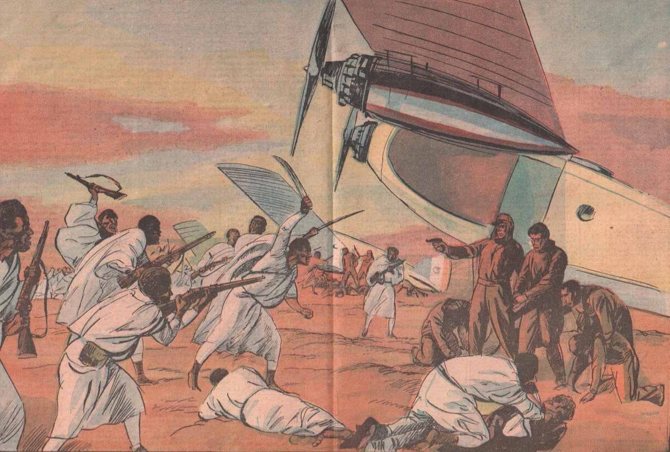 La pacification de l'Ethiope se porsouit lentement. Dans la nuit du 27 juin, une mission aérienne italienne, qui campait à proximité de Lékemti, chez les Galla, fut assaillie par les indigènes et massacrée après una lutte désespérét. Seul, l'aumôiner, le P. Borello, put s'enfuir.Parmi le quatorze victimes, se trouve le célèbre « as » de guerre, le commandant Locatelli.